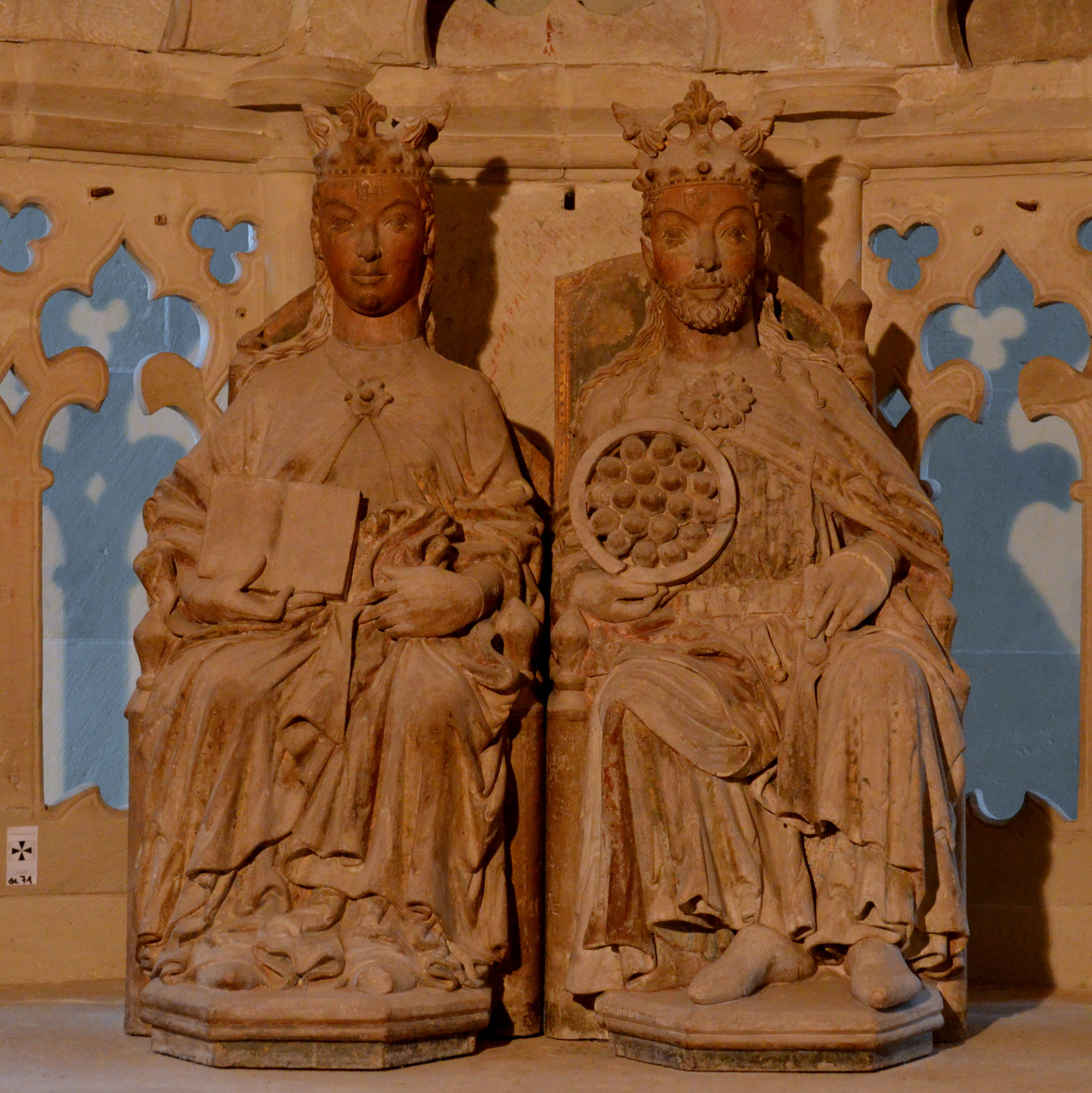 Maagdenburg, beelden Otto en Edith in de domkerk